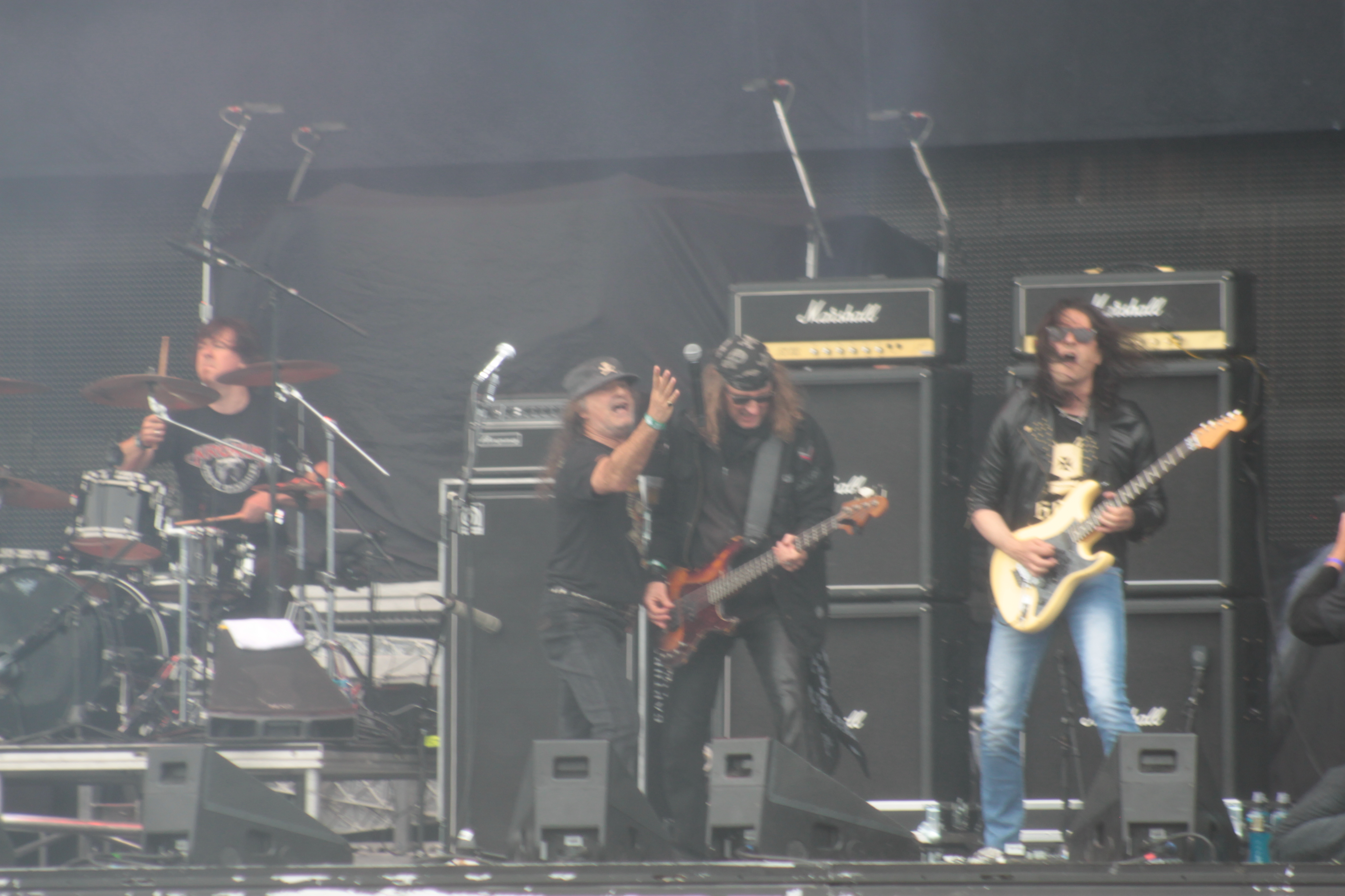 Krokus, Helfest 2013, Fr-44-Clisson.